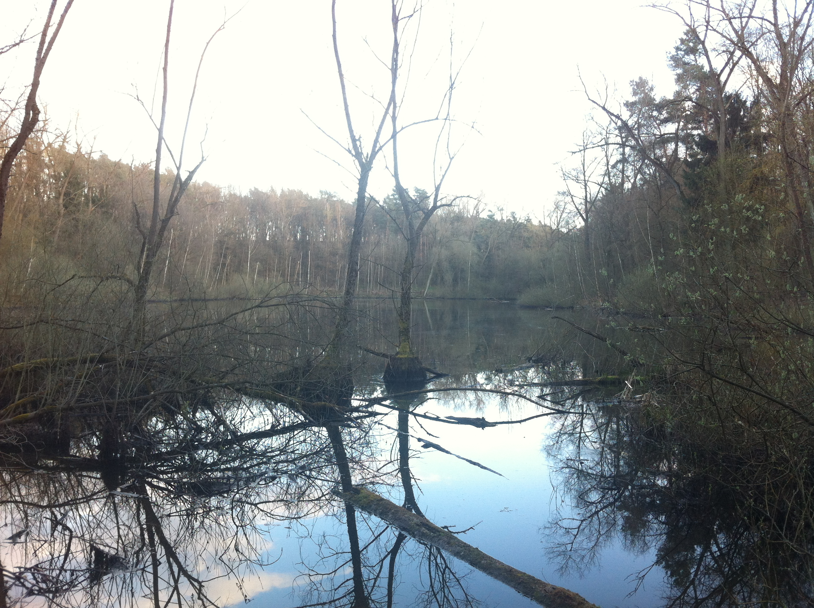 Blanke Hölle in Hohenwalde, Landschaftsschutzgebiet „Biegener Hellen“